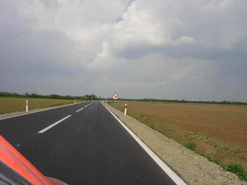 Državna cesta D517 (Baranja), između Petlovca i Širina (snimila: Vesna Nedić, 2006. godine)